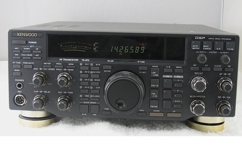 870s kenwood